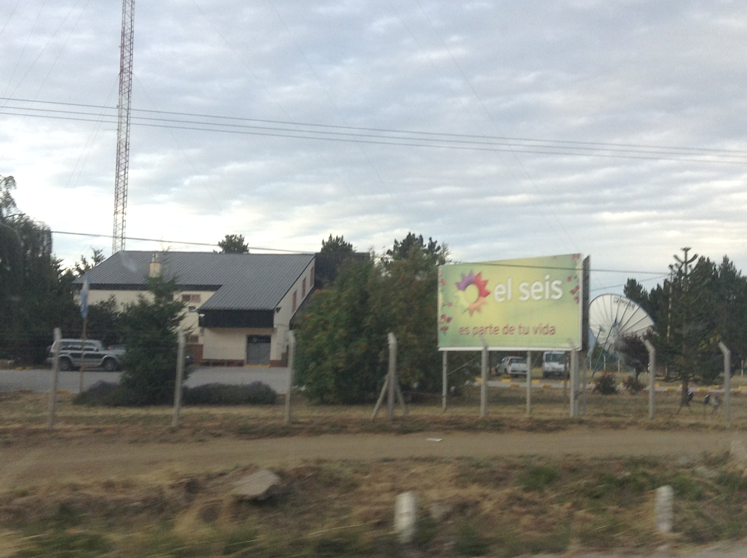 El Seis de Bariloche, Ruta Provincial 237